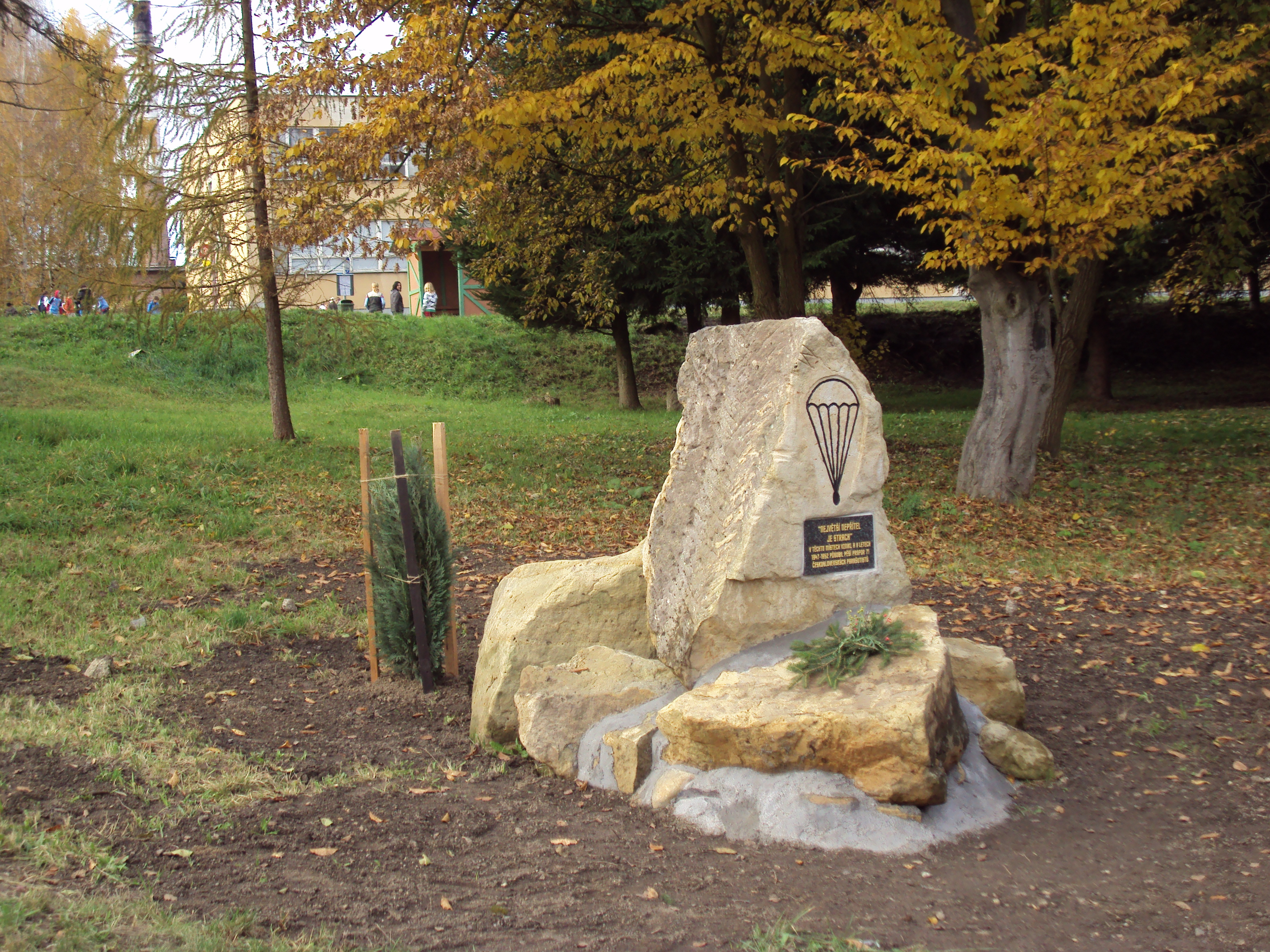 Pomník parašutistů v Nových Zákupech